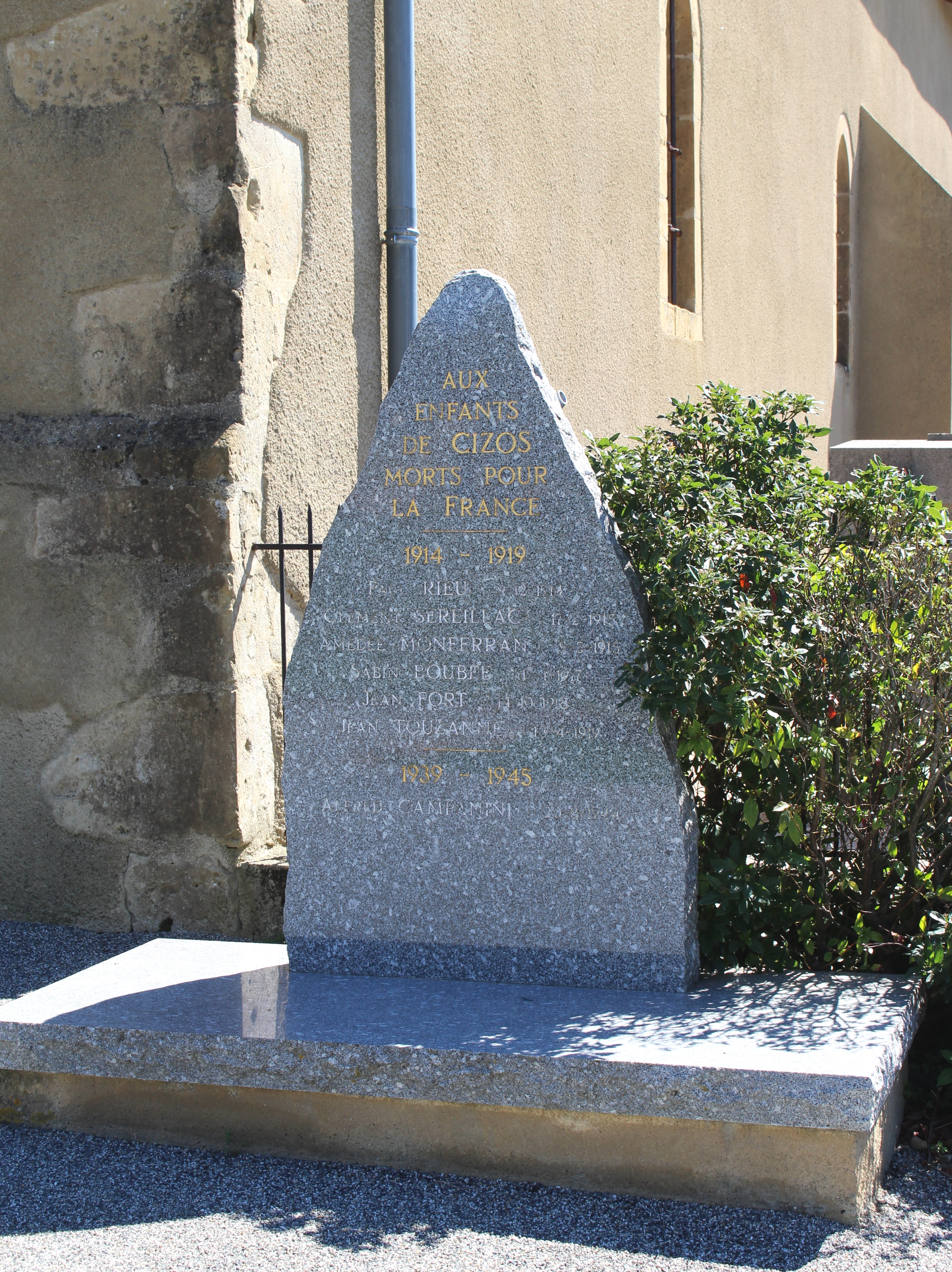 Monument aux morts de Cizos (Hautes-Pyrénées)